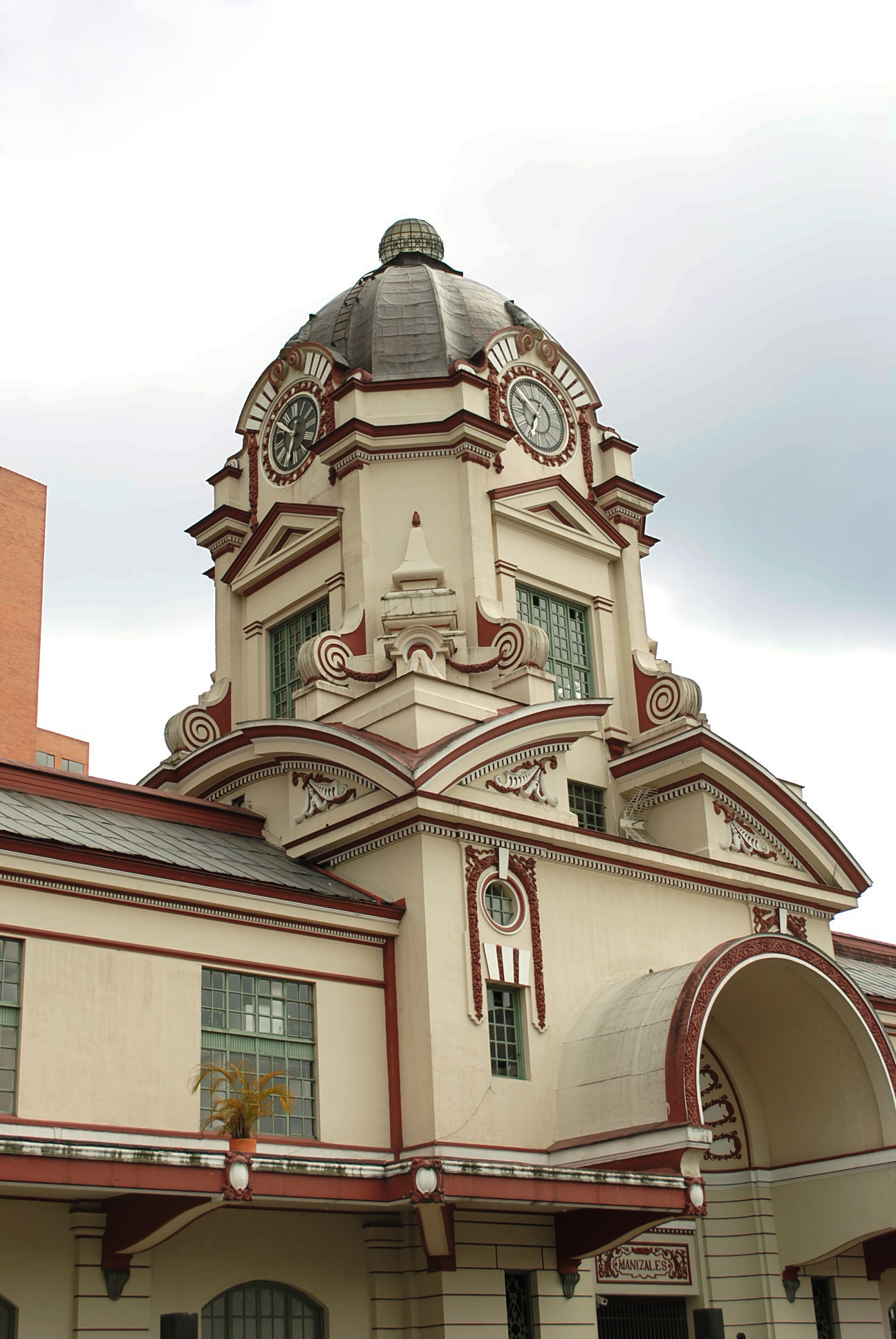 acercamiento de la Universidad Autónoma de Manizales, en este caso se da importancia y se resalta un poco el detalle del eje central de esta antes estacion